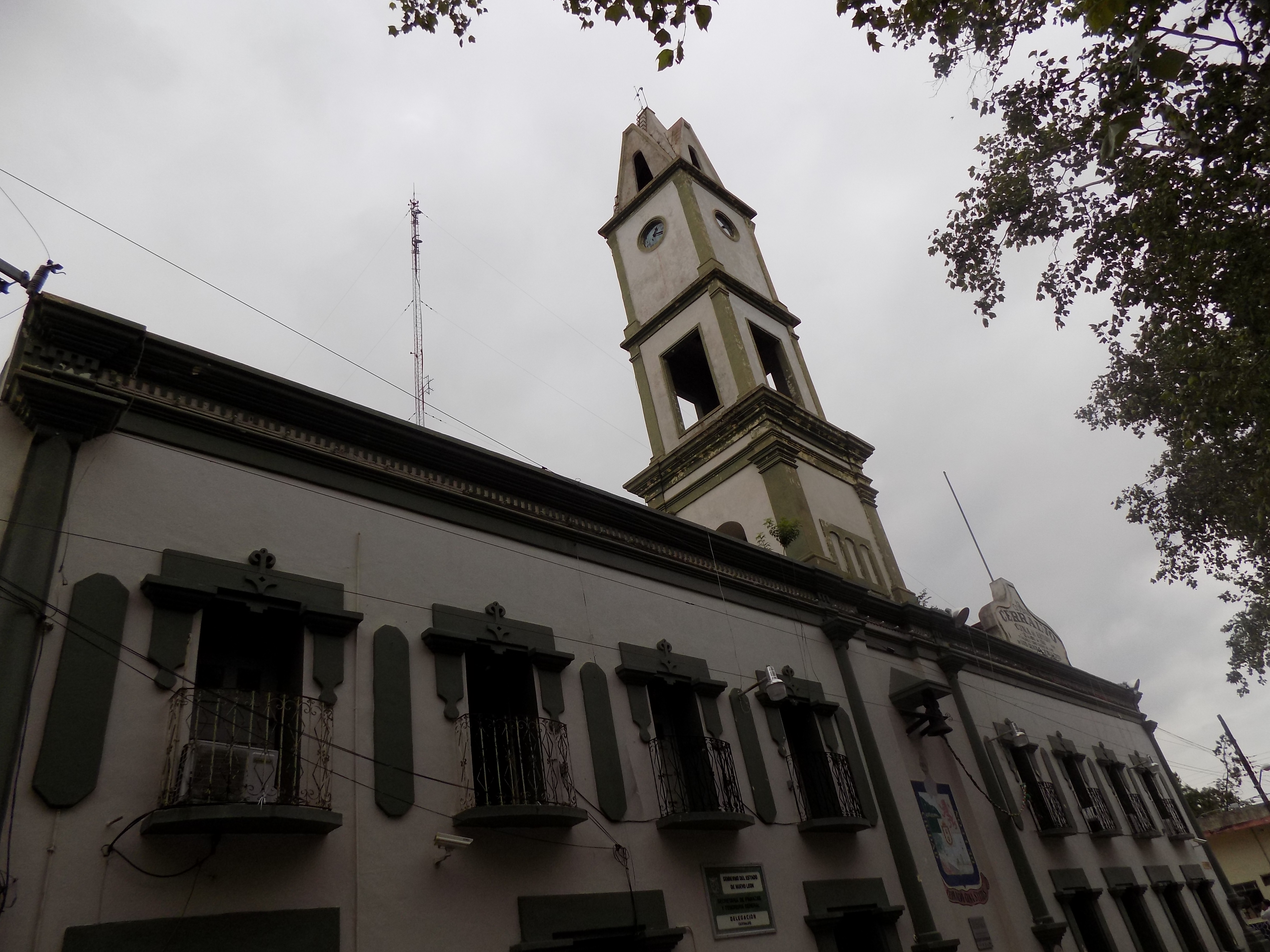 CUNA DEL ESTADO DE NUEVO LEON